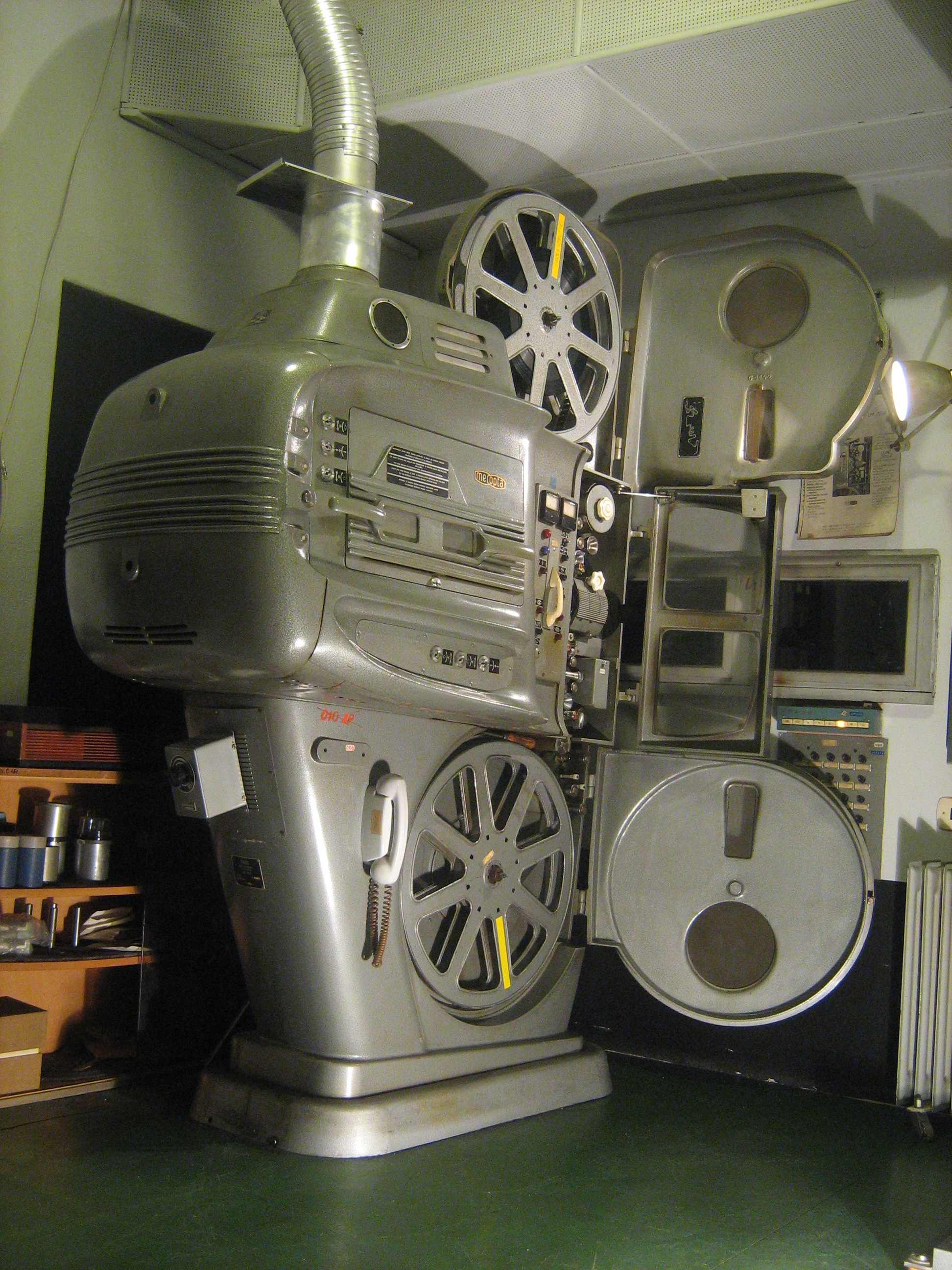 Na tomto snímku vyniká majestátnost projektoru... a také je jasné, proč se mu přezdívalo slůně.